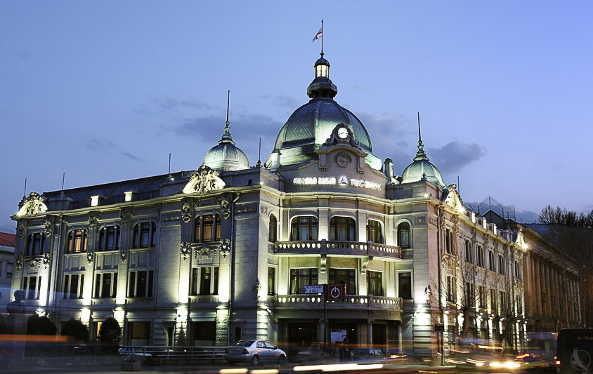 הסניף הראשי של TBC Bank בכיכר החירות טביליסי.